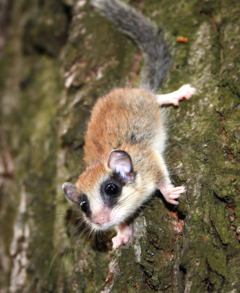 Dryomys nitedula in young age (соня лісова в молодому віці)